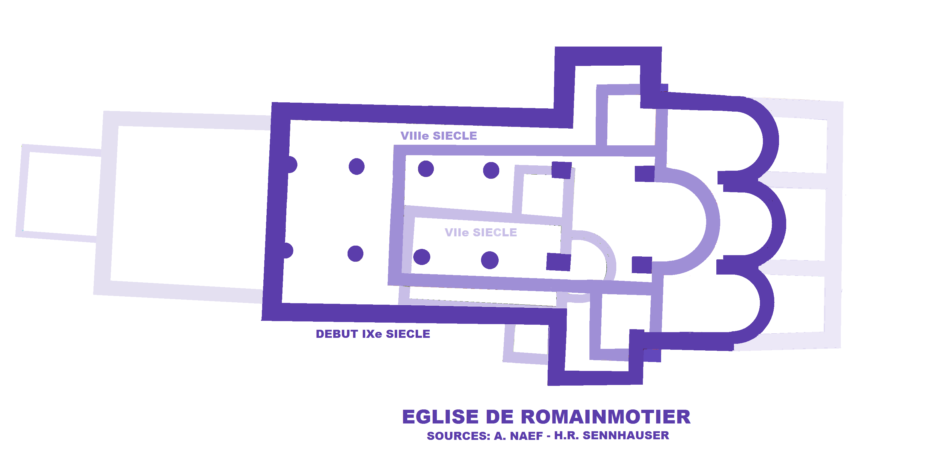 Eglise de Romainôtier, phases de construction